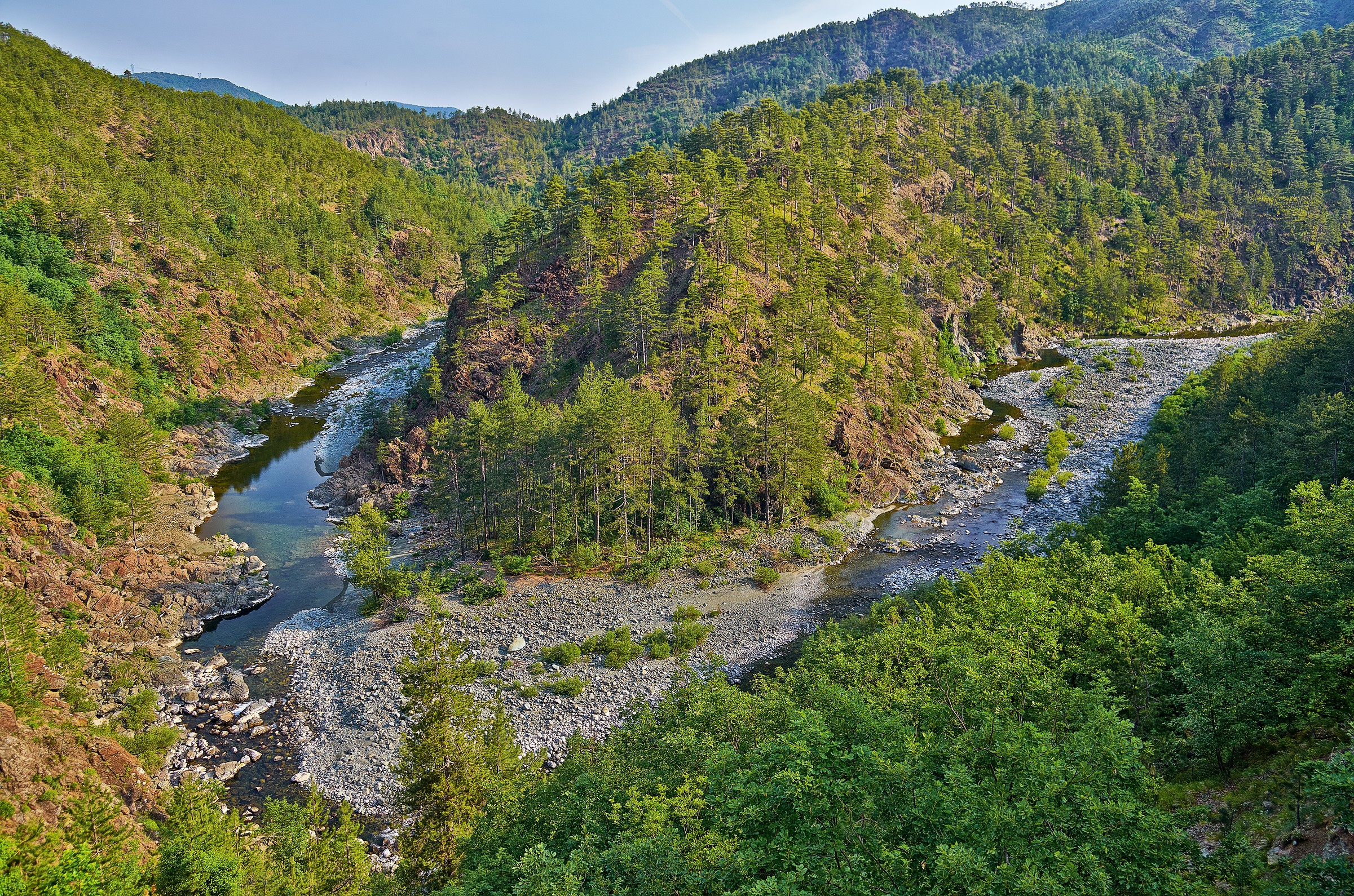 Ansa dell'Orba